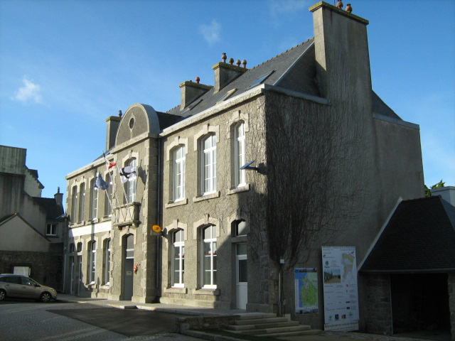 gg